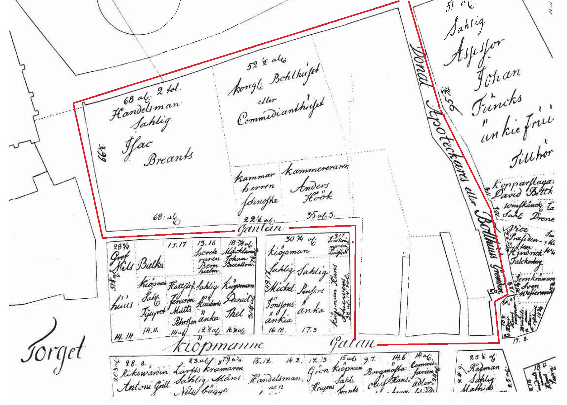 Tomtkarta för Phaeton, Pygmalion, Europa m.fl. omkring år 1700